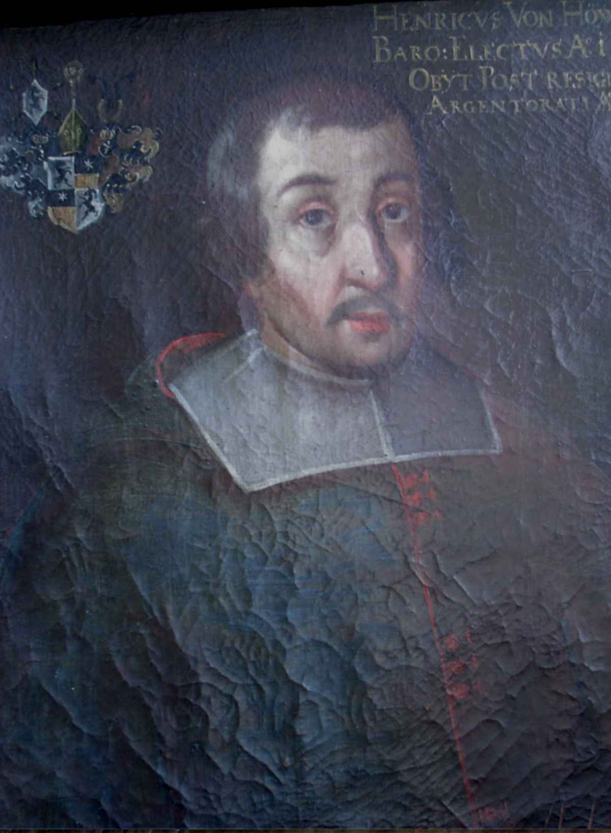 Heinrich von Hewen († 1519/20) Fürstbischof von Chur 1491-1503/5